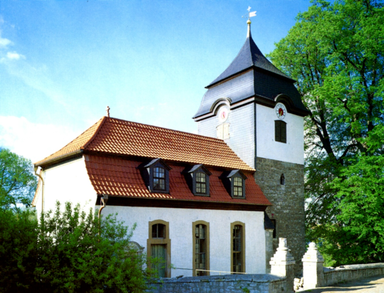 Schöten